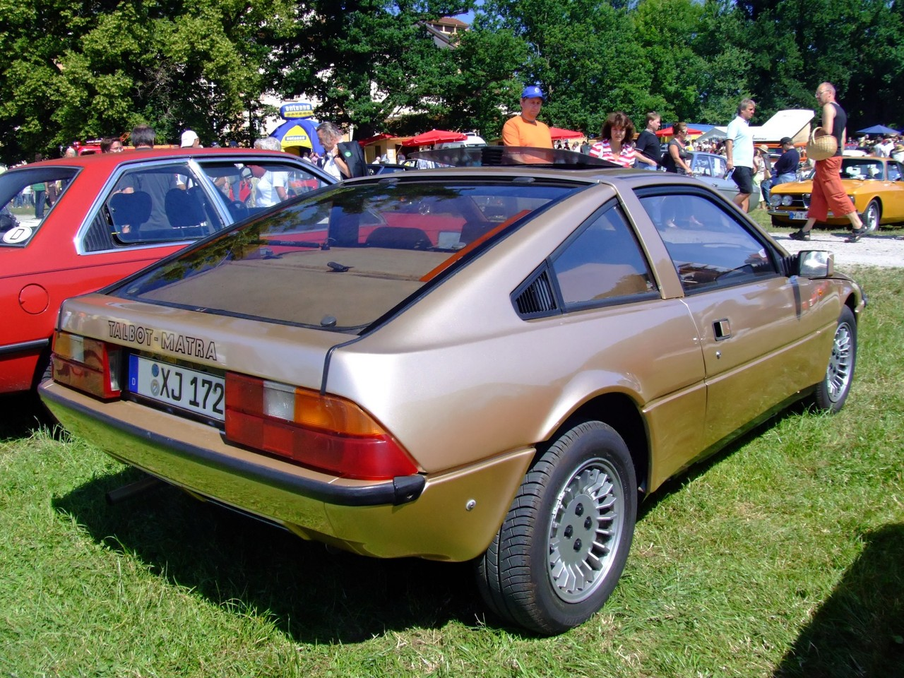 Quelle: selbst fotografiert, 06/2007 Fotograf: Späth Chr.